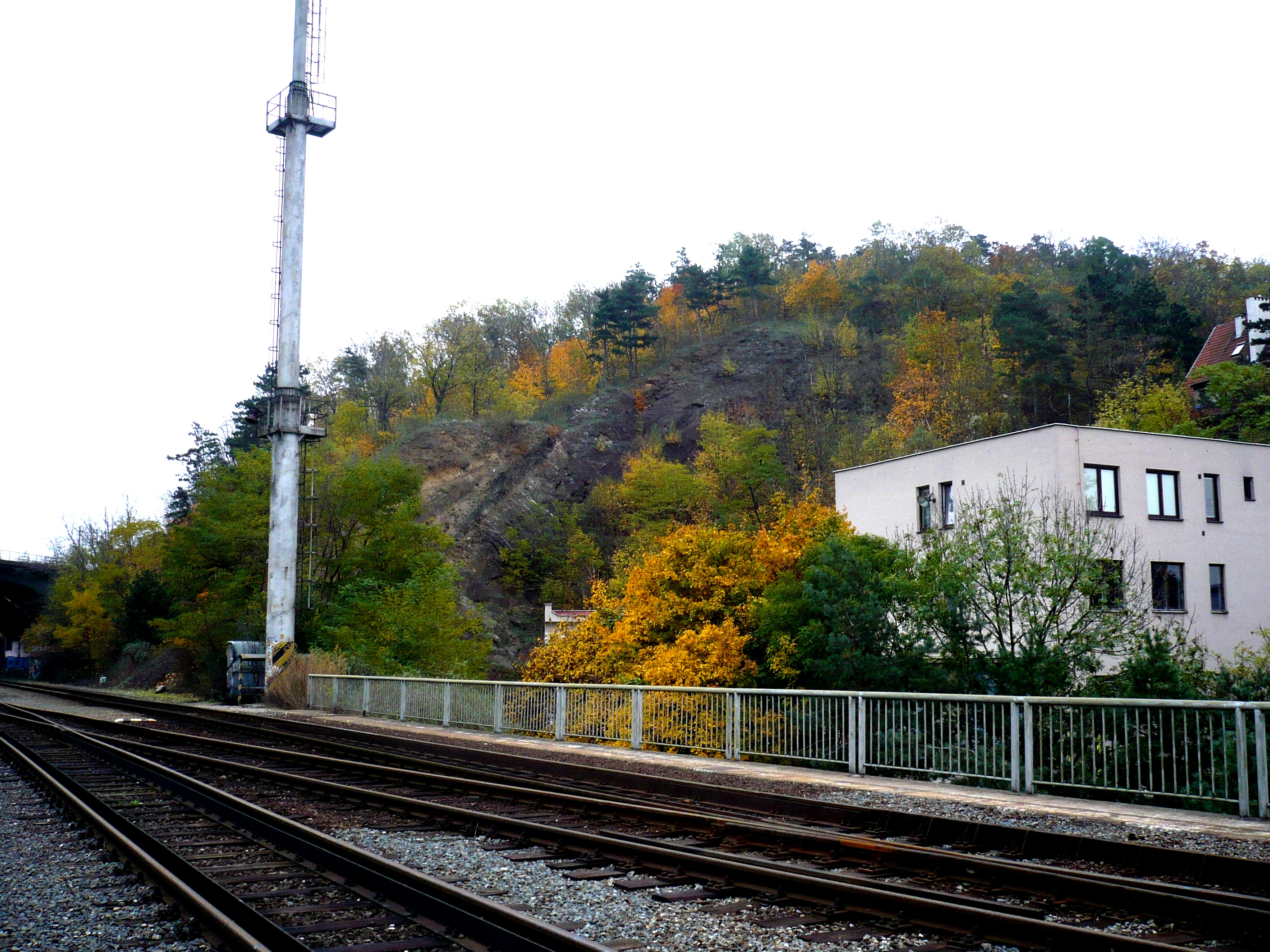 Pohled na lom z malého železničního mostu